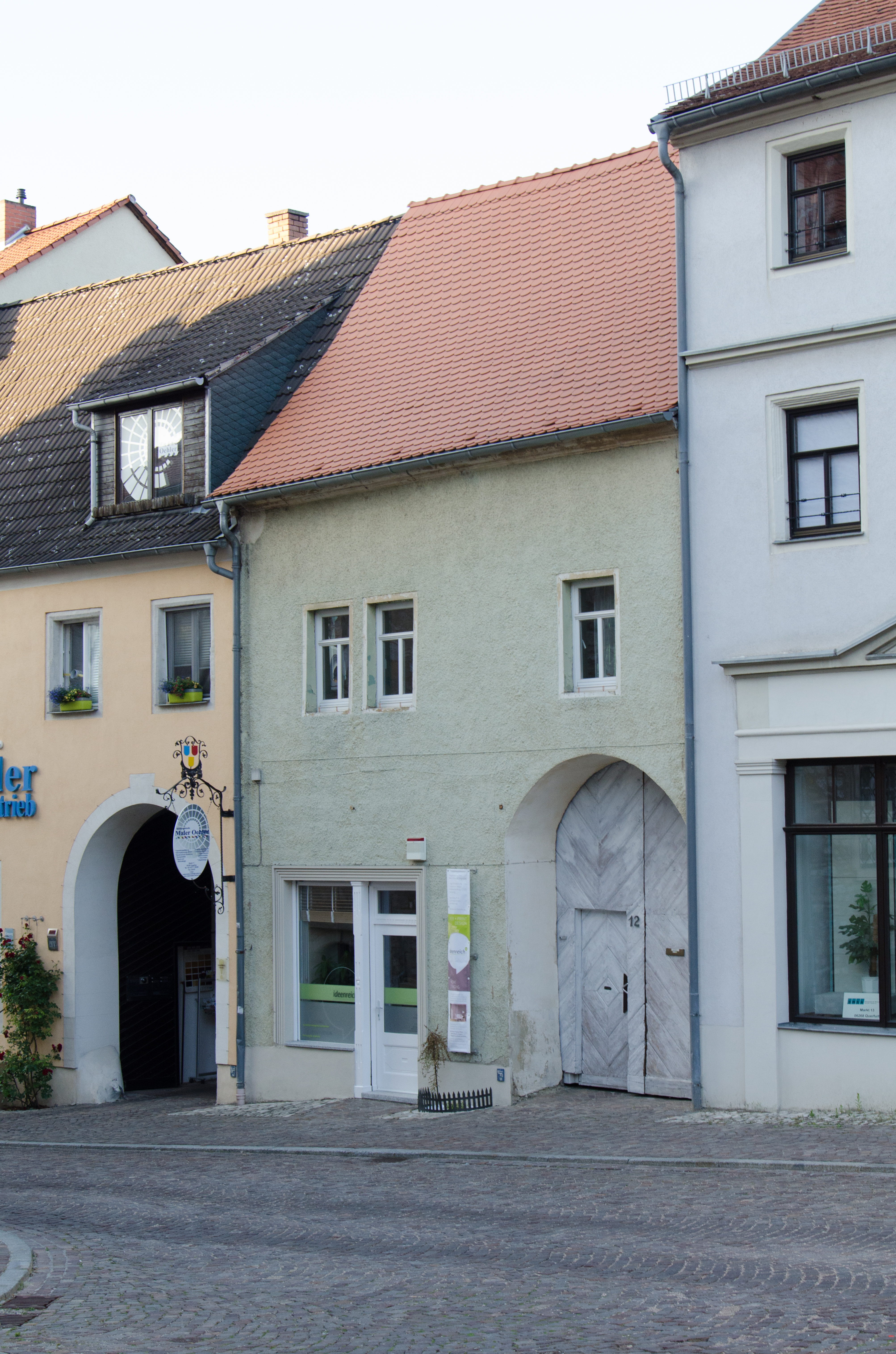 Querfurt, Markt 12